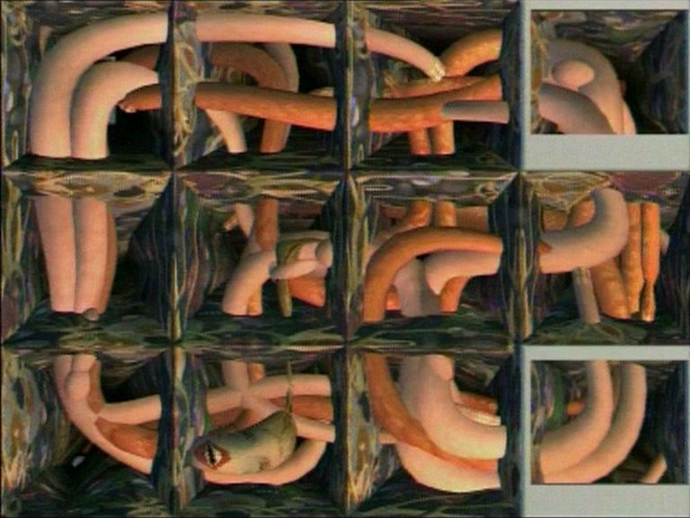 Image extraite de Cloison, film d'animation de Bériou.